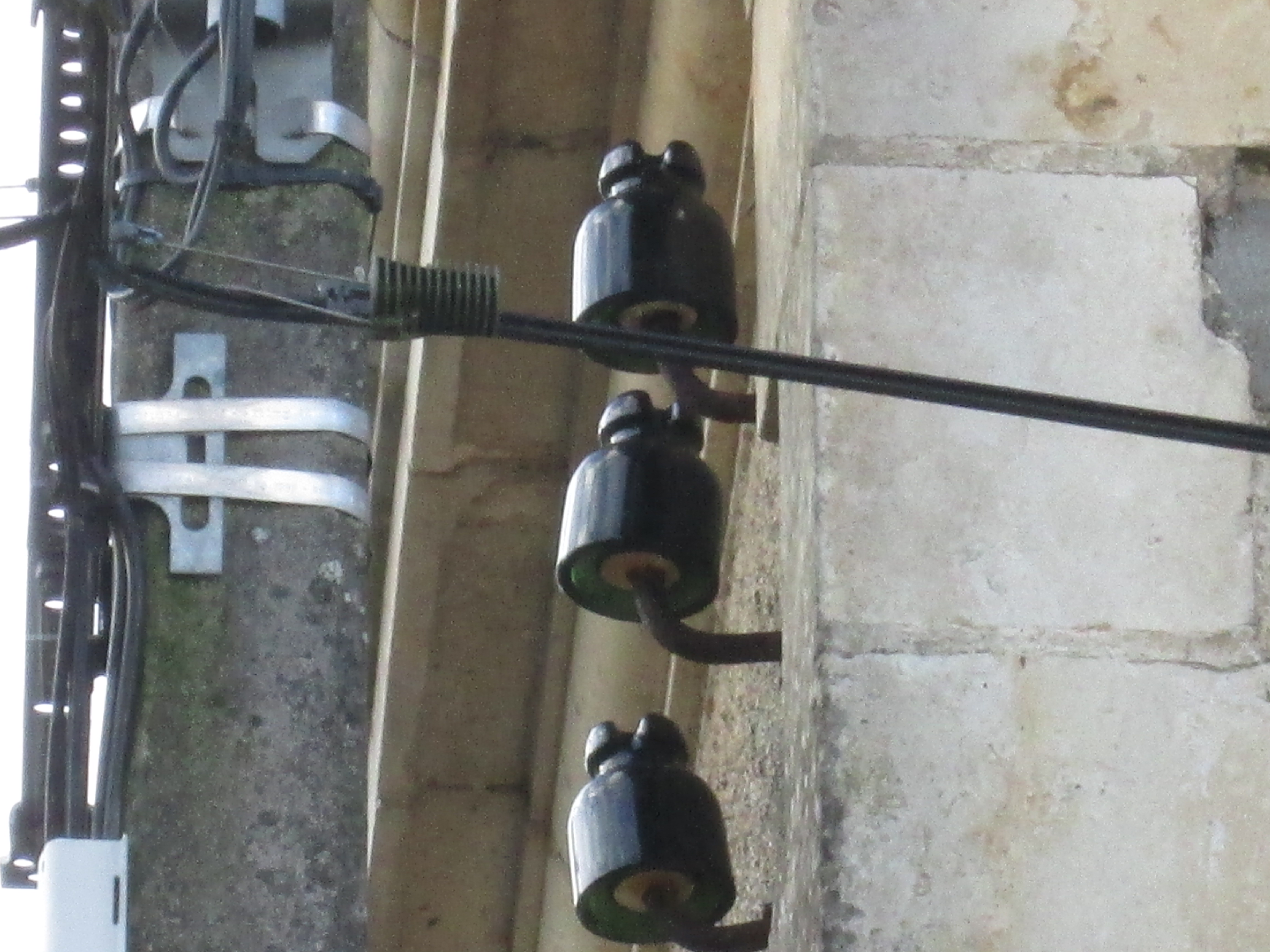 Photographie prise à Luçon en Vendée et montrant trois isolateurs en verre "vert-bouteille" qui ont été produits par la verrerie Charbonneaux de Reims sous la marque de "Isorex", modèles datant des années 1920 environ.